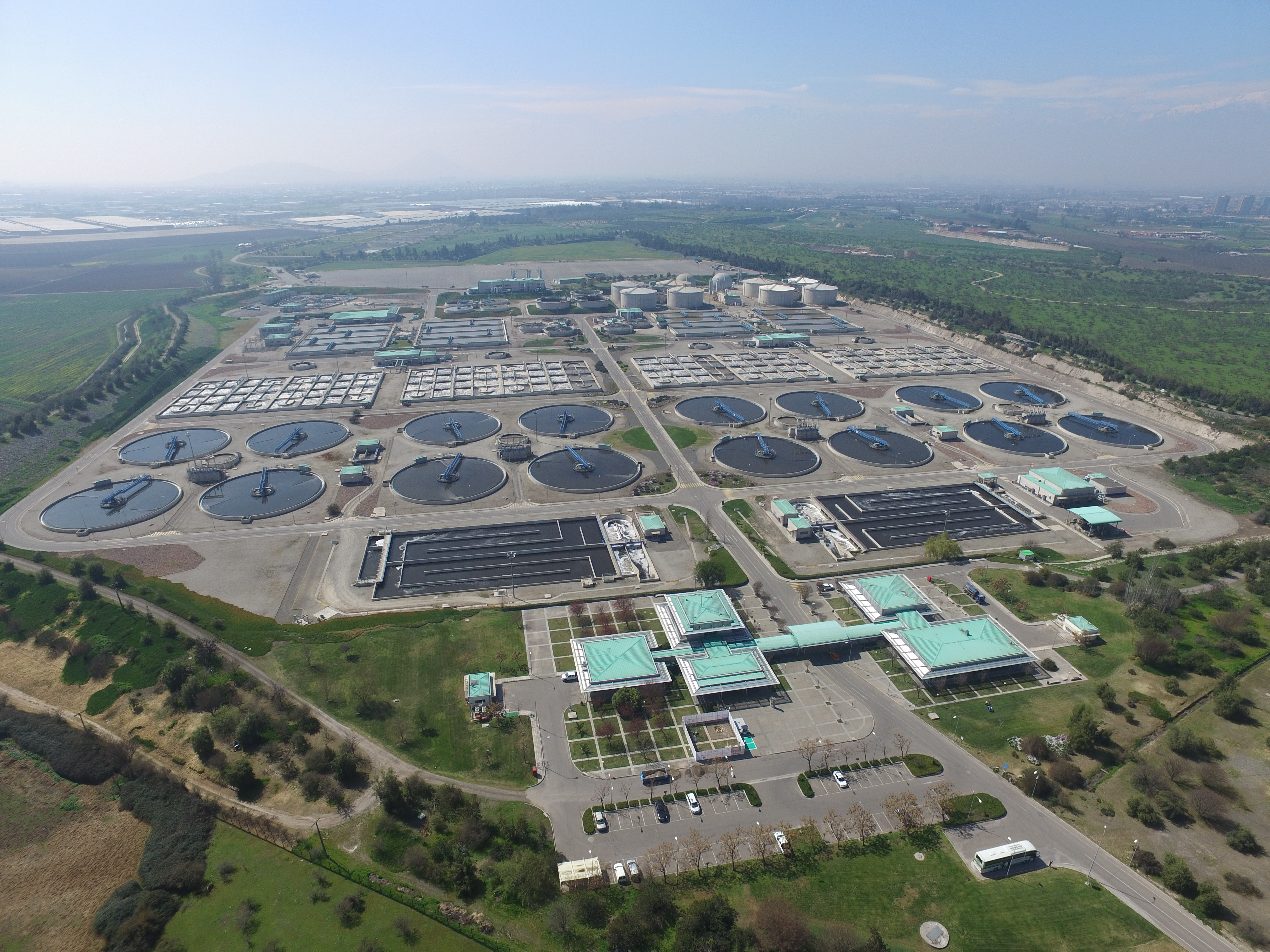 Biofactoría ubicada en la ciudad de Santiago, Chile.